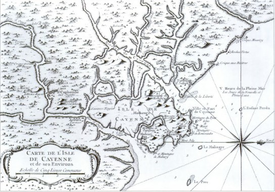 Carte de l'Isle de Cayenne et de ses Environs